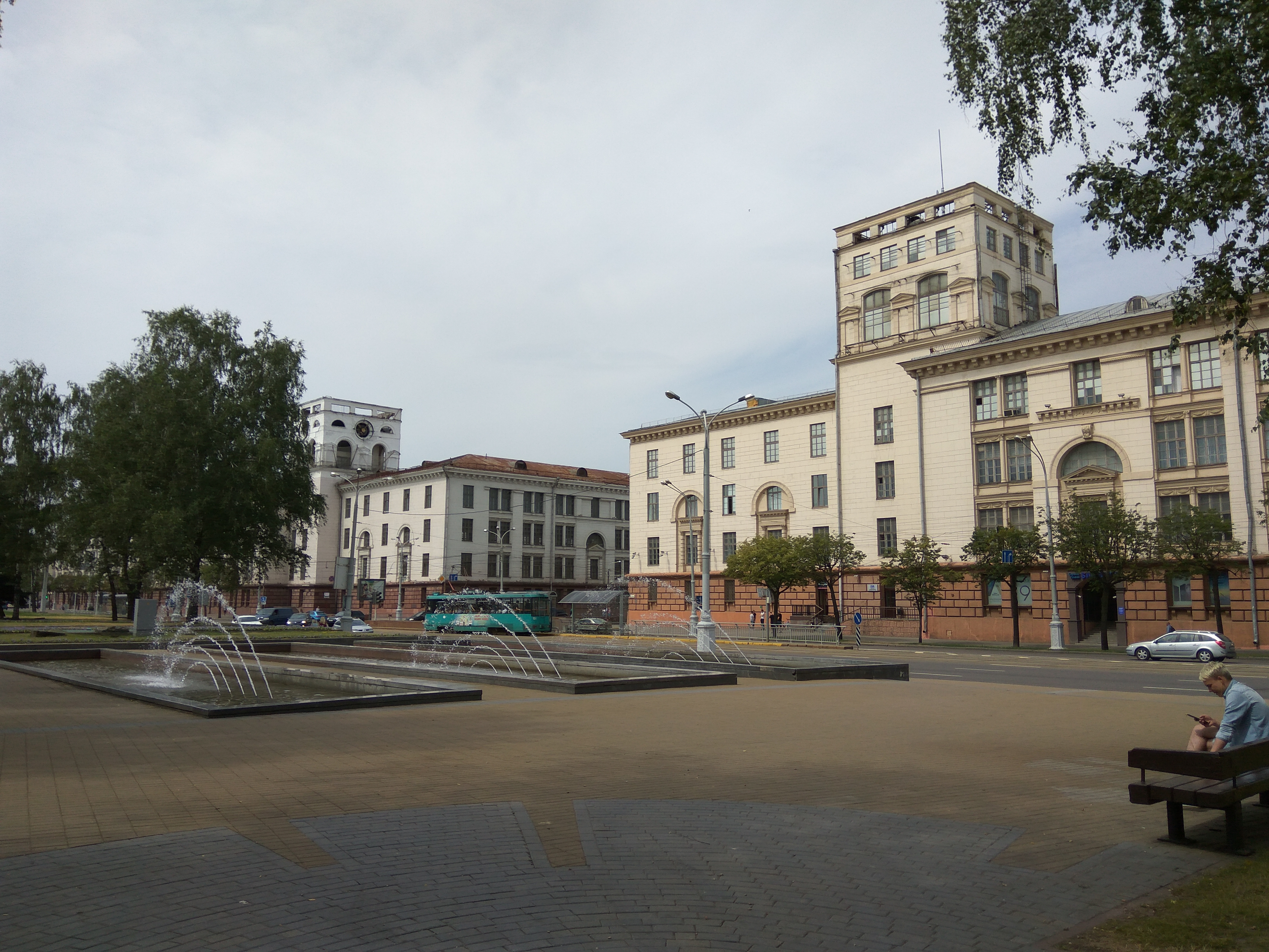 Мінск. Плошчы Якуба Коласа (2018)